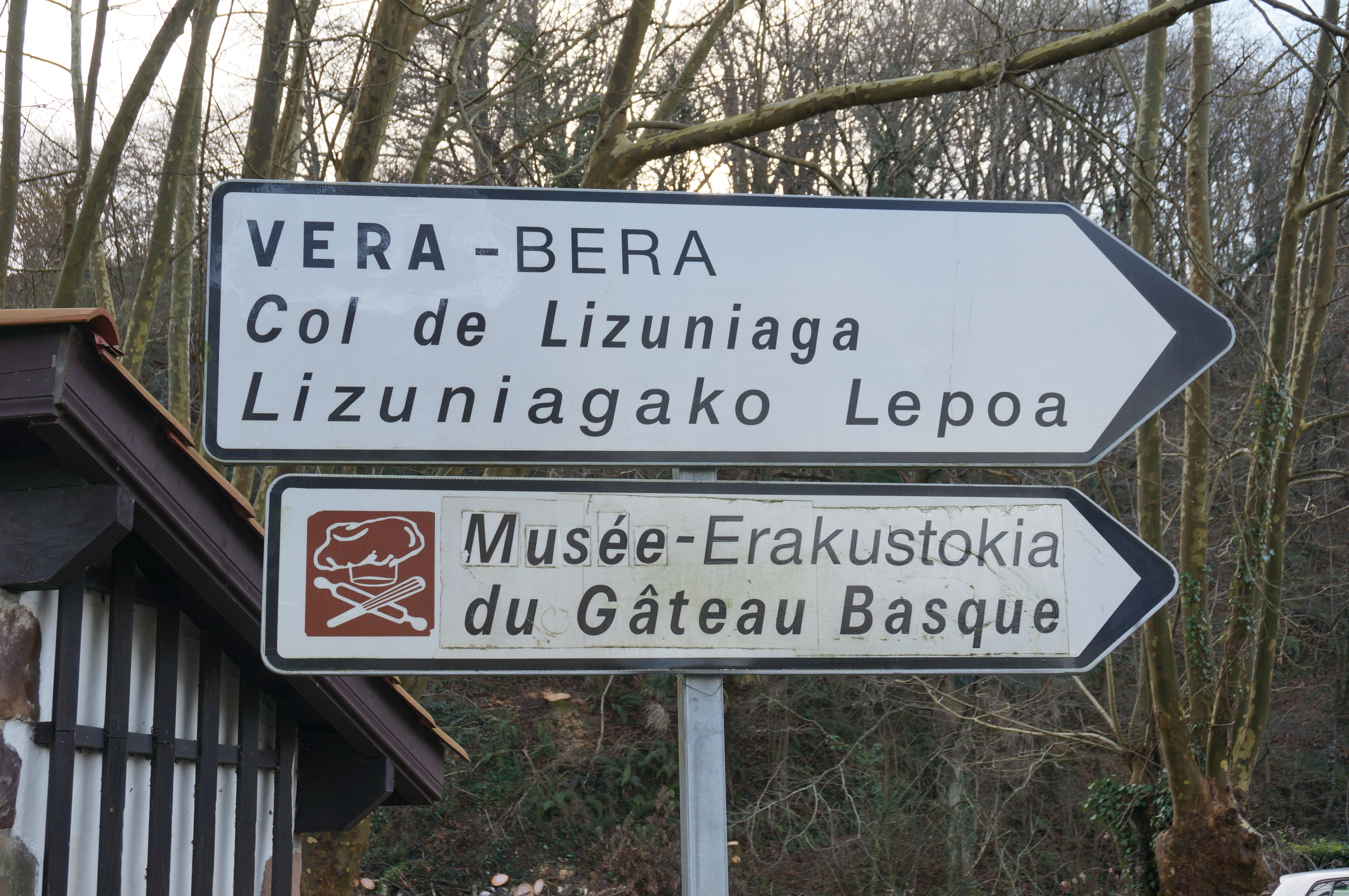 Panneaux bilingues à Sare